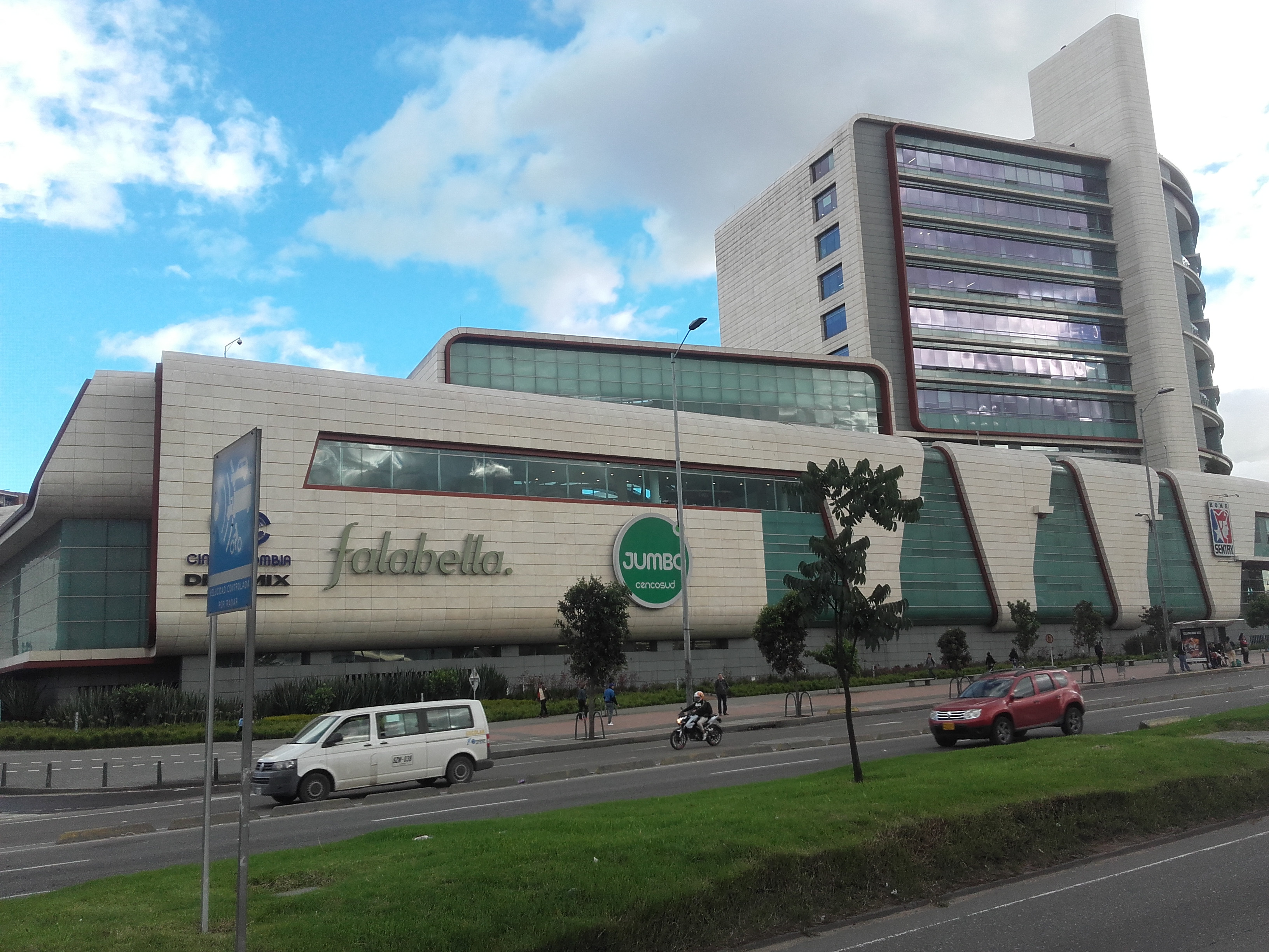 kxkdkdkfkfnmfmfmfmfkfkmfm